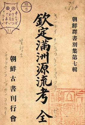 조선고서간행회에서 1916년 간행한 《흠정만주원류고》.